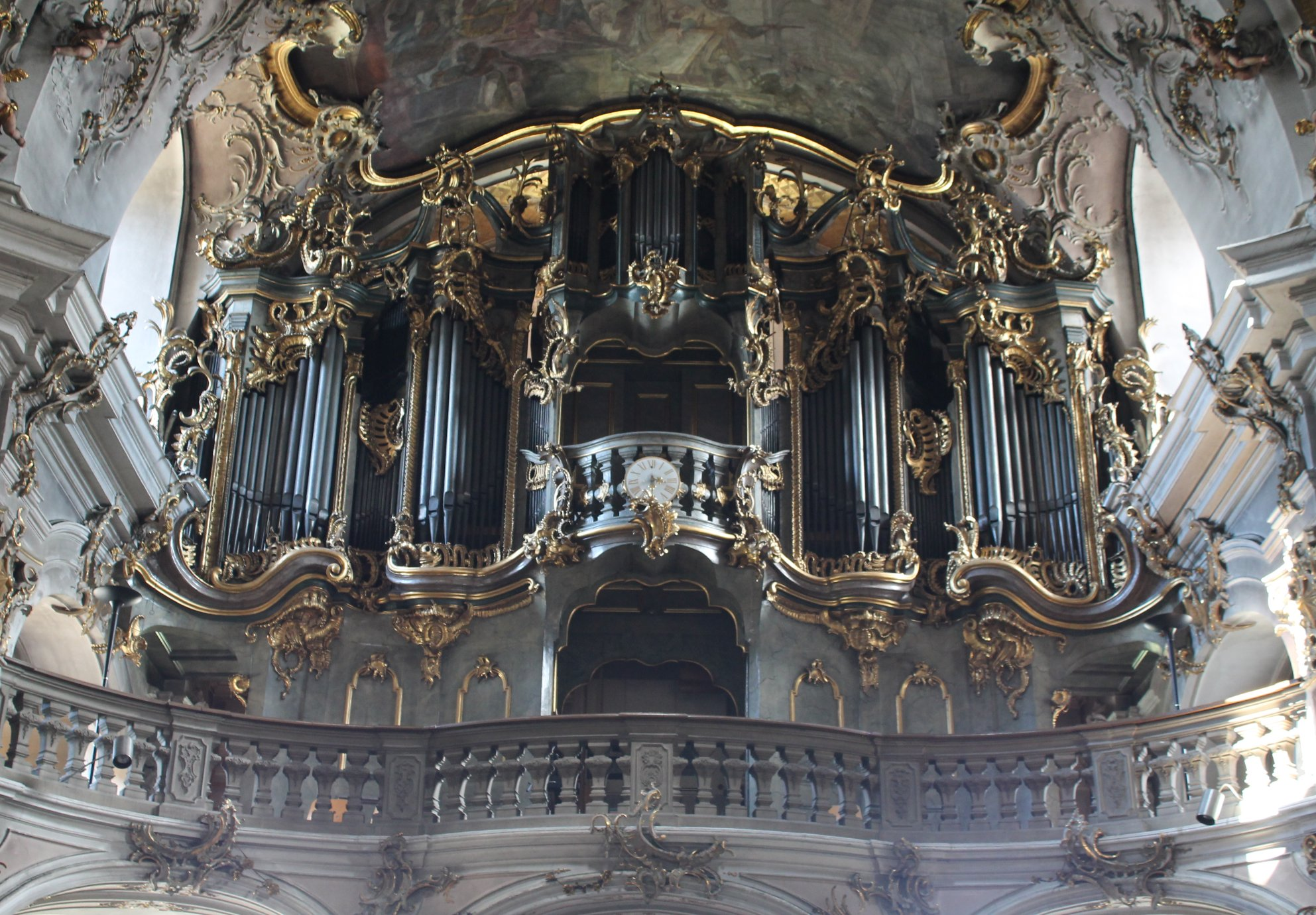 Orgel des Käppele in Würzburg (1991, Vleugels, II/31; Prospekt von J. C. Köhler von 1752)